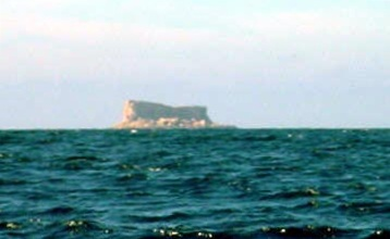 Das Bild zeigt die Insel Filfla 5 km südlich vor Malta. Die Photographie entstand von einem Boot in der Nähe der Blauen Grotte aus.